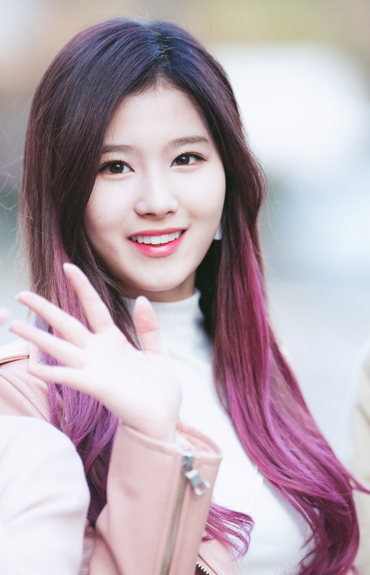 170303 뮤직뱅크 출근길 트와이스